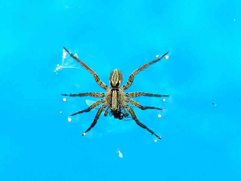 spider, araña, aranha Bastabales - Galicia - Spain. Alopecosa sp.